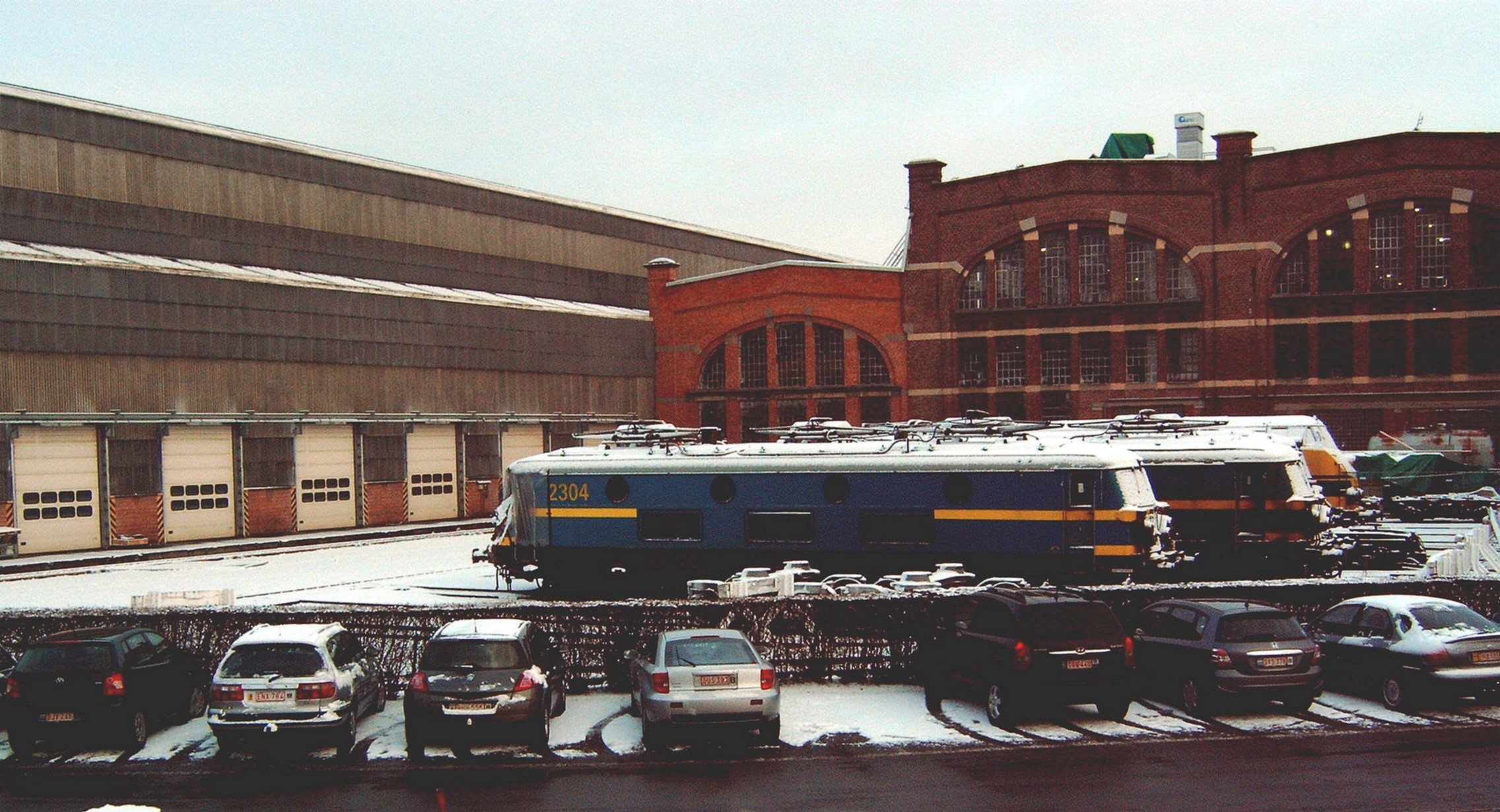 De werkplaats van de Belgische spoorwegen in Salzinnes. Eigen opname van 1-3-2006.